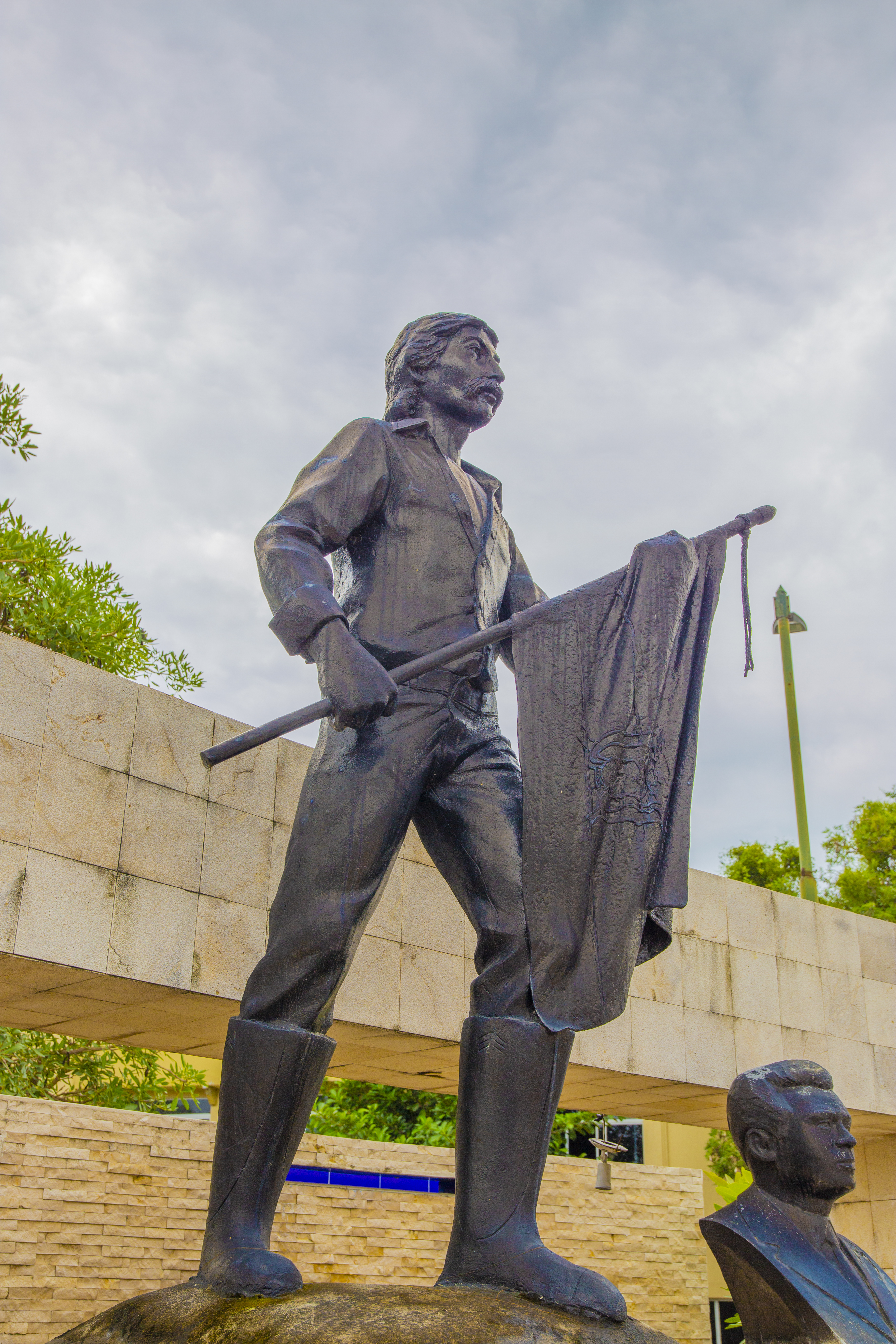 En octubre del 2014 fue colocado un monumento de Arturo Jarrin en una plazoleta de la Universidad de Guayaquil. Junto con una placa con los nombres de treinta y cinco miembros de la agrupación Alfaro Vive ¡Carajo!.